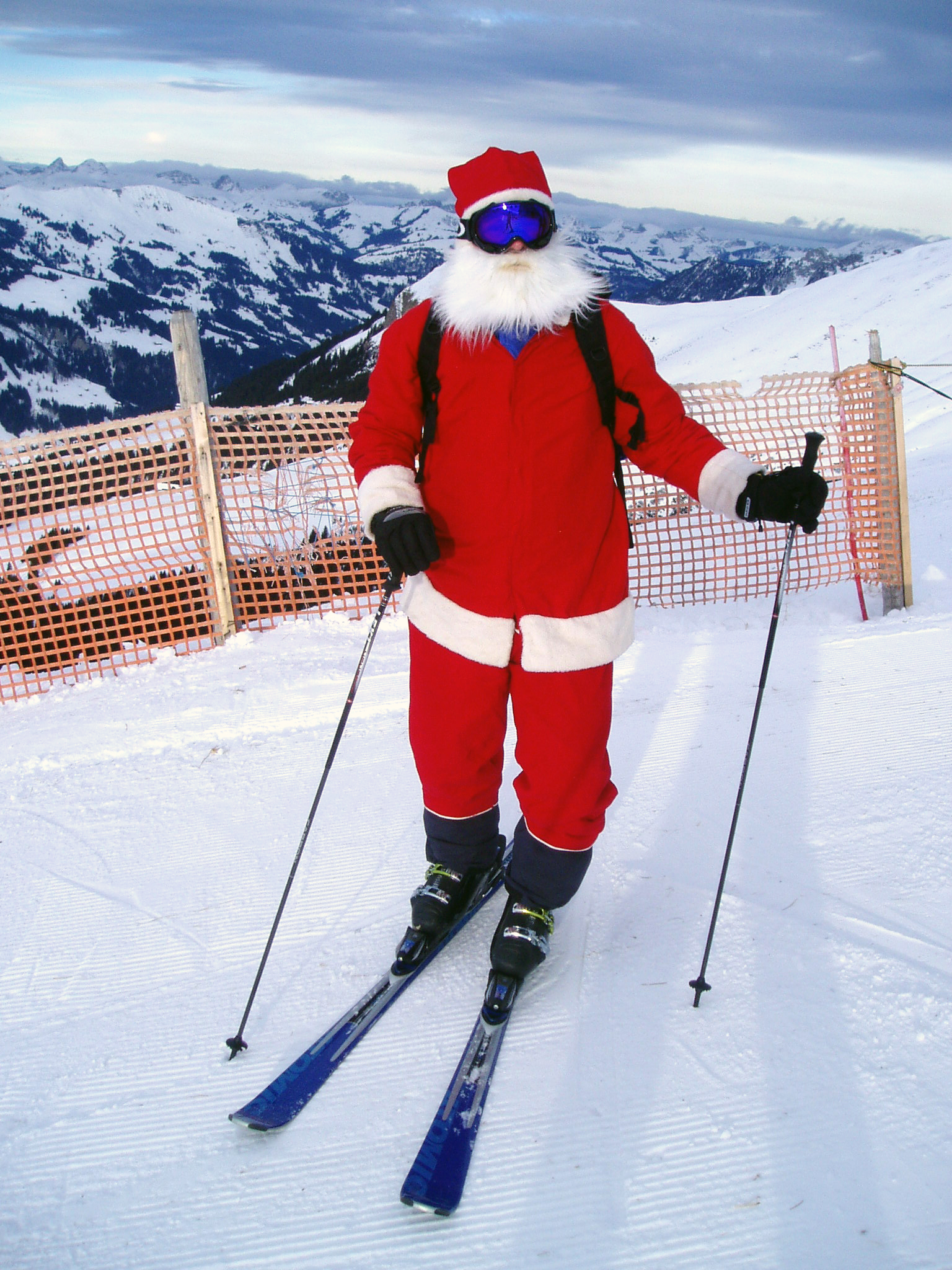 Santa Clause on skies in Adelboden, Switzerland